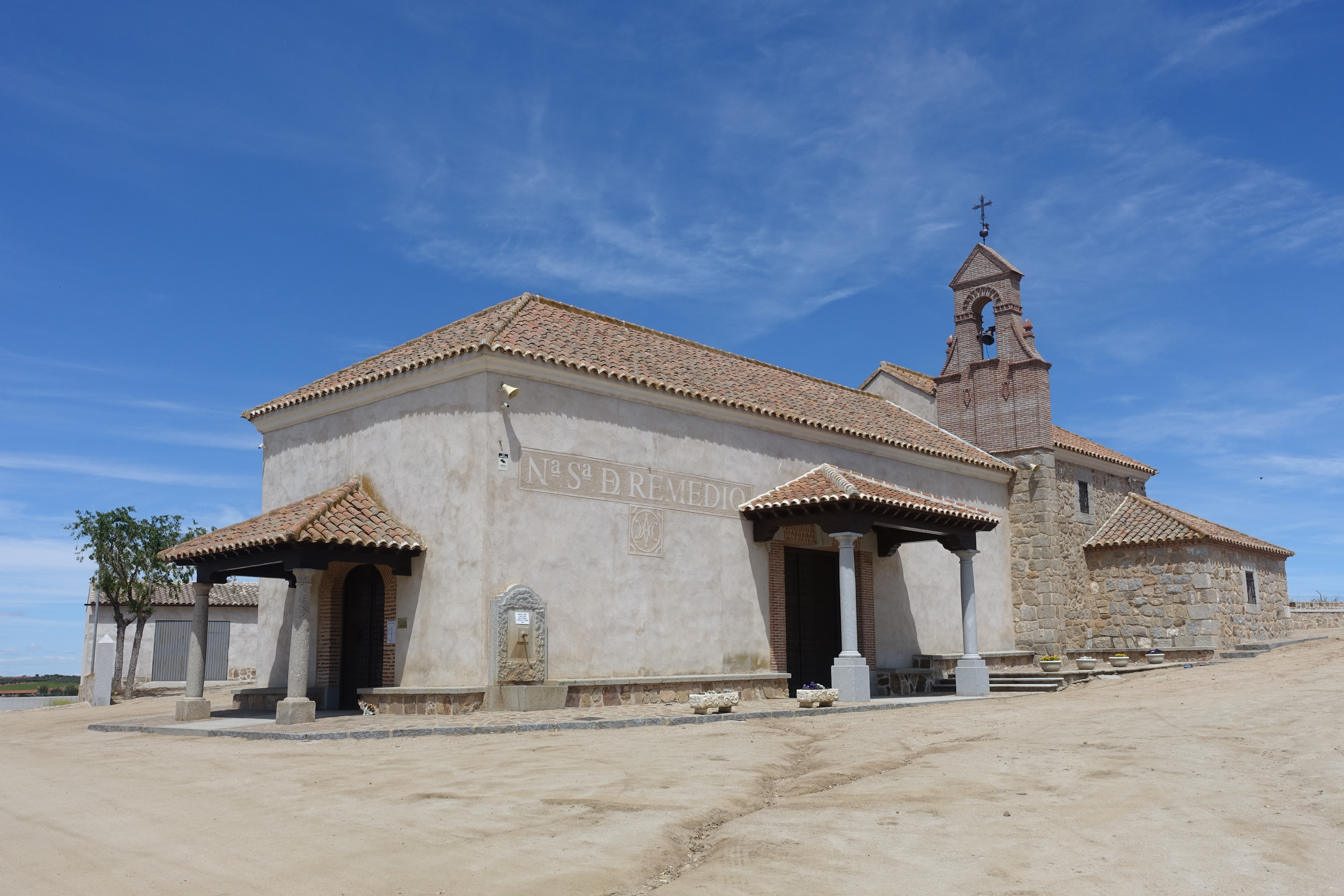 Ermita de Nuestra Señora de los Remedios, en Cuerva (Toledo, España).